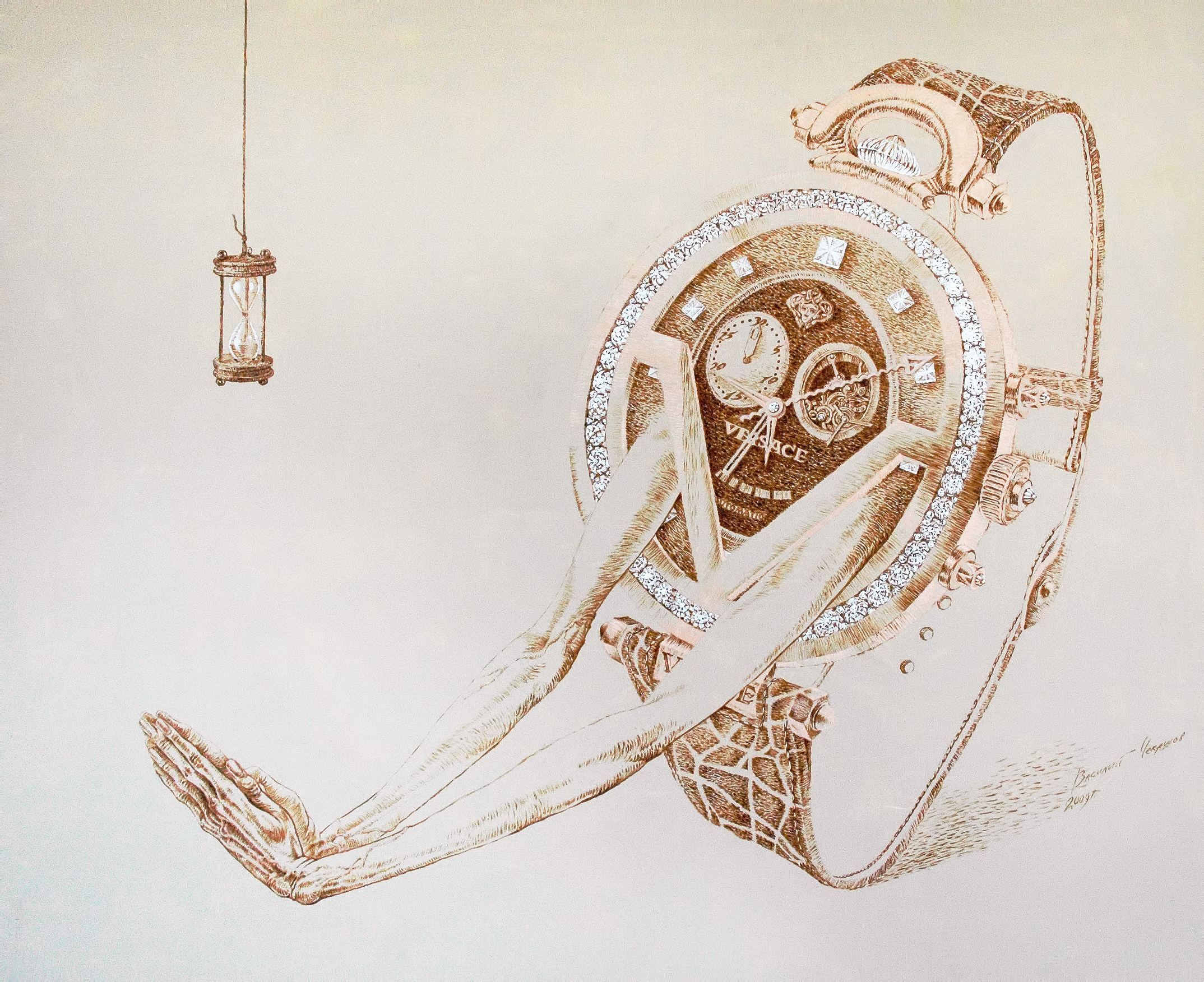 MEMENTO MORI. Холст, масло, 120Х100 см. 2009г